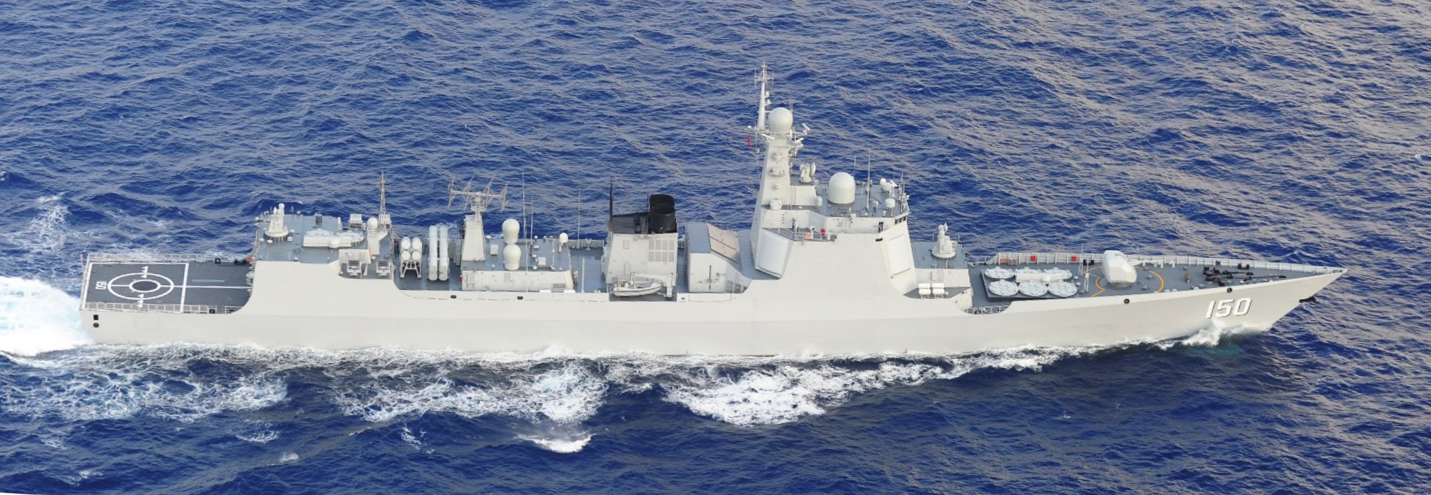 ４月２０日（金）午前１０時半頃、海上自衛隊第１３護衛隊所属「さわぎり」（佐世保）、第５護衛隊所属「あきづき」（佐世保）及び第５航空群所属Ｐ－３Ｃ（那覇）が、与那国島（沖縄県）の南約３５０ｋｍの海域を東進する中国海軍クズネツォフ級空母「遼寧」１隻、ルーヤンⅢ級ミサイル駆逐艦１隻、ルーヤンⅡ級ミサイル駆逐艦３隻、ジャンカイⅡ級フリゲート２隻の計７隻を確認した。 また、同日午前１１時頃、同海域でクズネツォフ級空母「遼寧」から複数の艦載戦闘機（推定）が飛行するのを確認した。 防衛省として、太平洋上においてクズネツォフ級空母「遼寧」から艦載戦闘機（推定）が飛行するのを確認したのは、今回が初めてである。